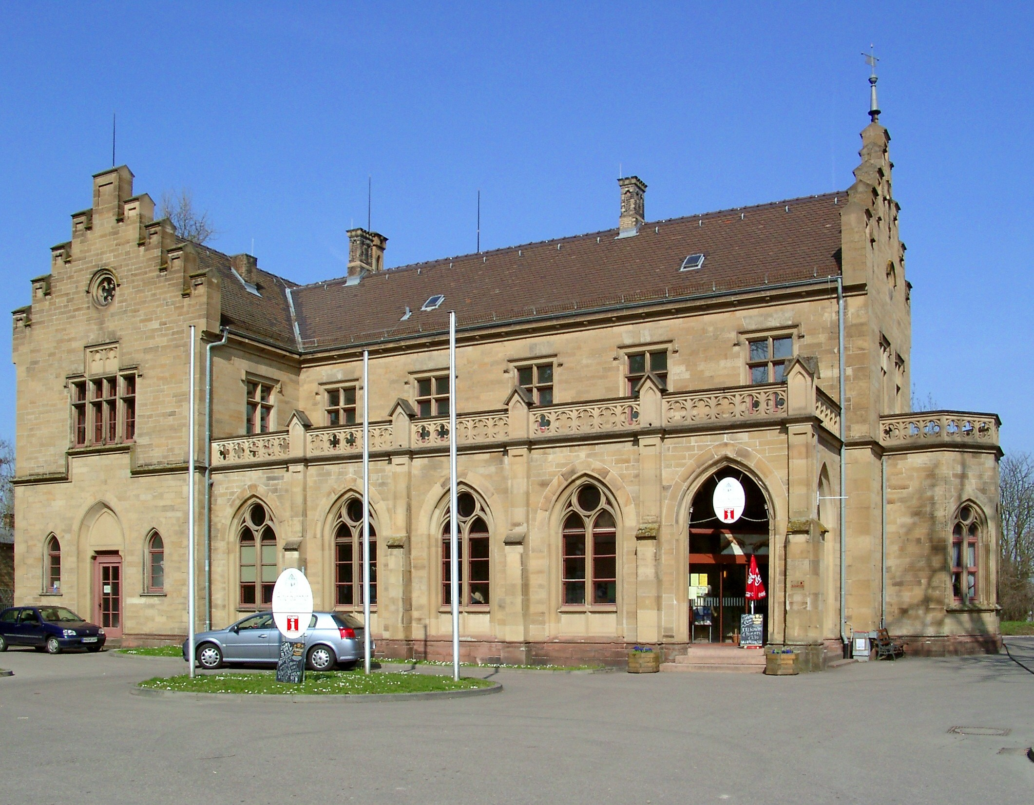 Bad Wimpfen, Bahnhof